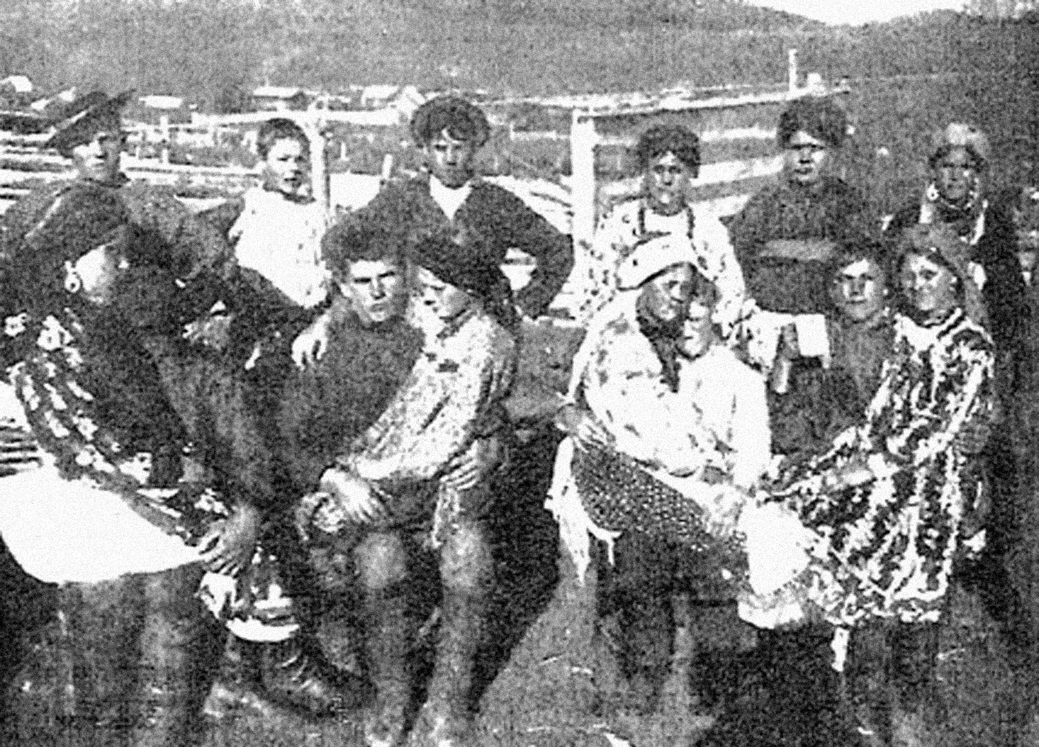 Бухтарминские старообрядцы. Праздничное гуляние молодежи. Источник: Бухтарминские старообрядцы. Материалы комиссии экспедиционных исследований. Серия Казахстанская. Вып. 17. Л., 1930.